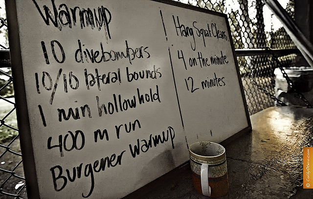 Tableau du WOD